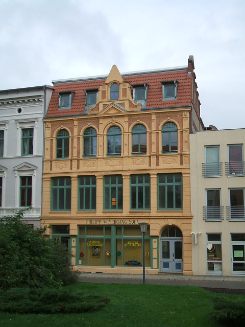 Kaufhaus Weyergang in Stralsund